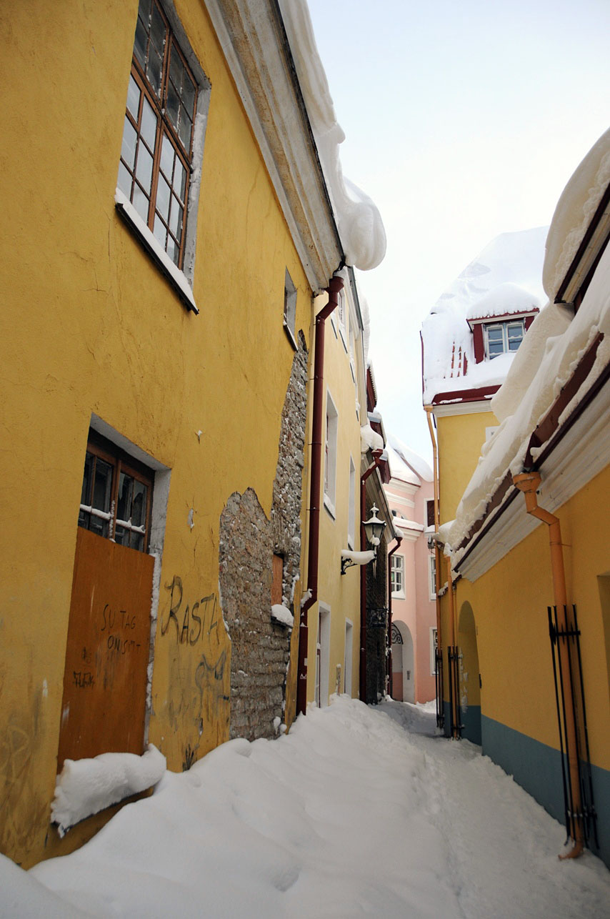 Rahukohtu ja Toom-Rüütli tänavate lõpp Toompeal.